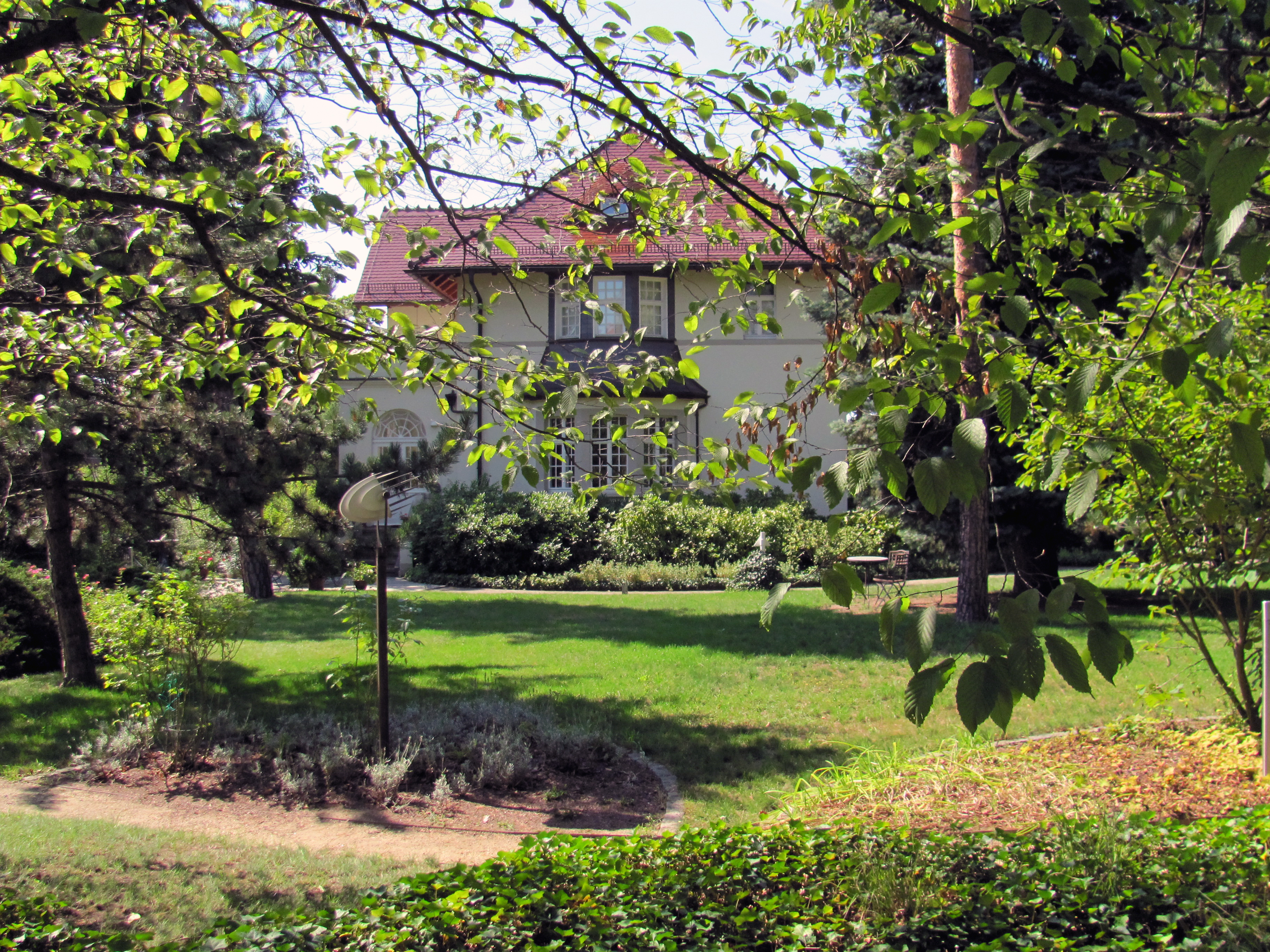 Radebeul (Gemarkung), Villa Heinrich Findeisen